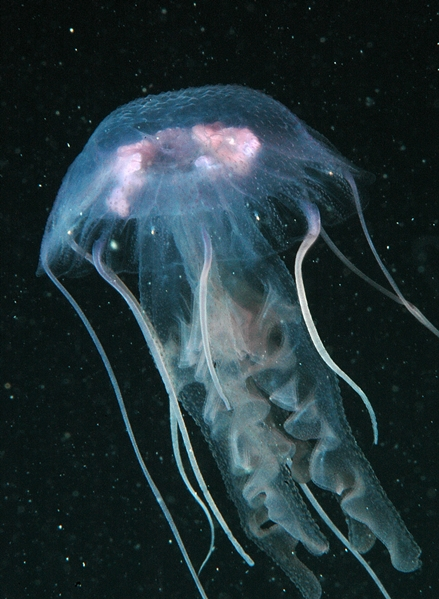 Pelagia noctiluca